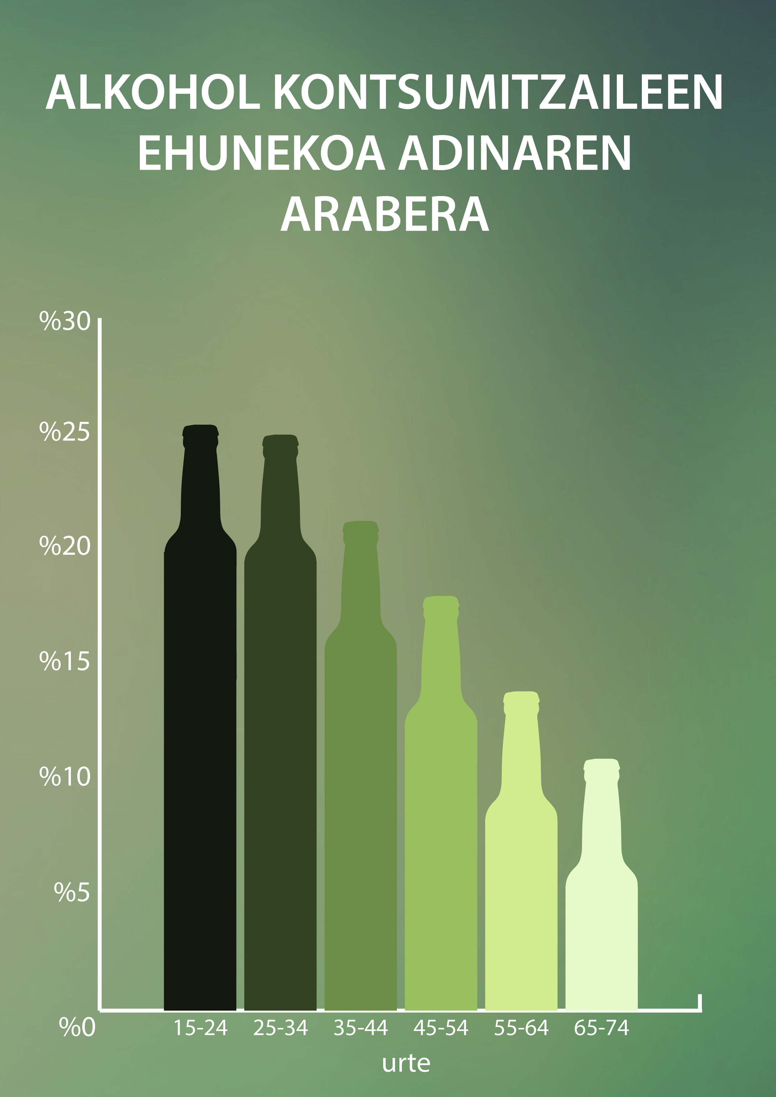 Alkohol kontsumitzaileen ehunekoa adinaren arabera